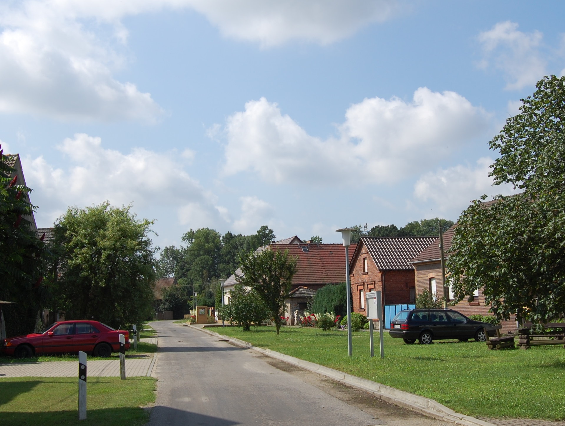 Straße in Fleißdorf bei Vetschau